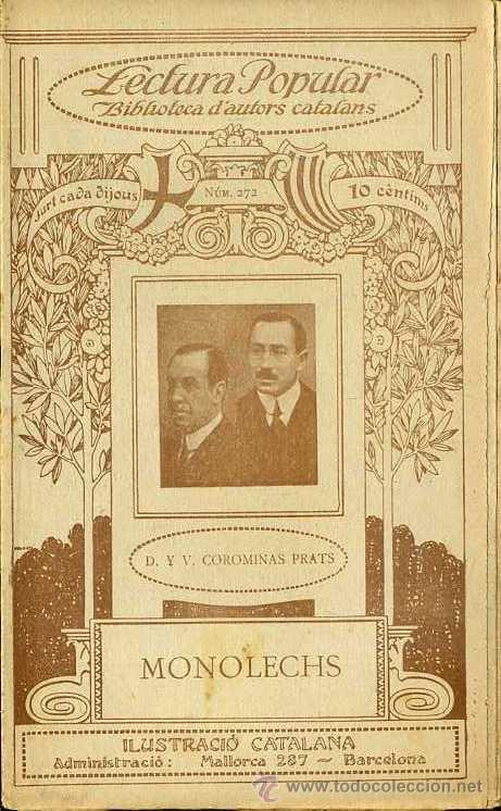 Monolech